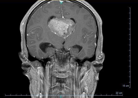 Neurocytome du ventricule latérale droit en coupe coronale